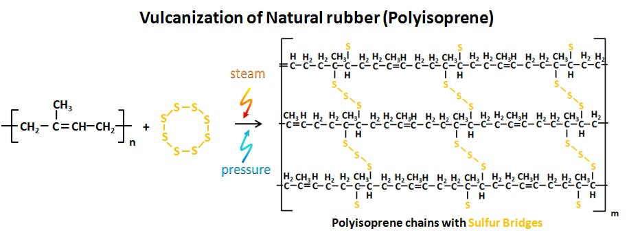 Vulcanisatie van natuurrubber